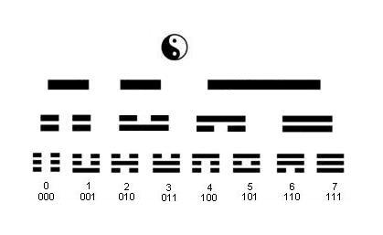 Der duale Aufbau der Trigramme